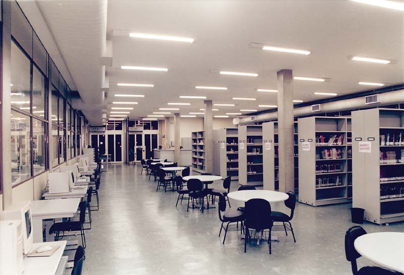 Parte interna da biblioteca da Odontologia